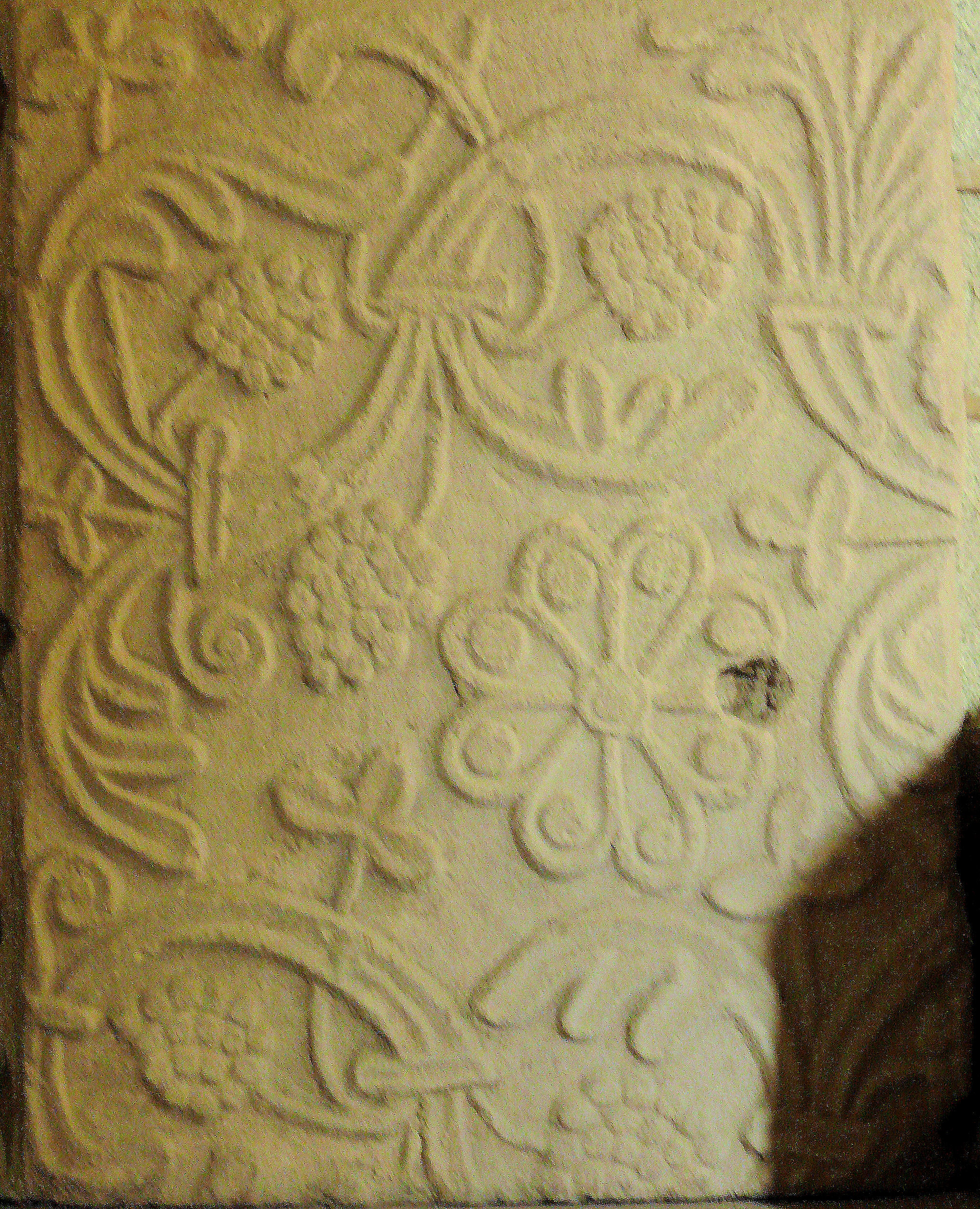 Manglieu - Abbatiale Saint-Sébastien - Plaque tumulaire du VIe siècle déposée dans le narthex